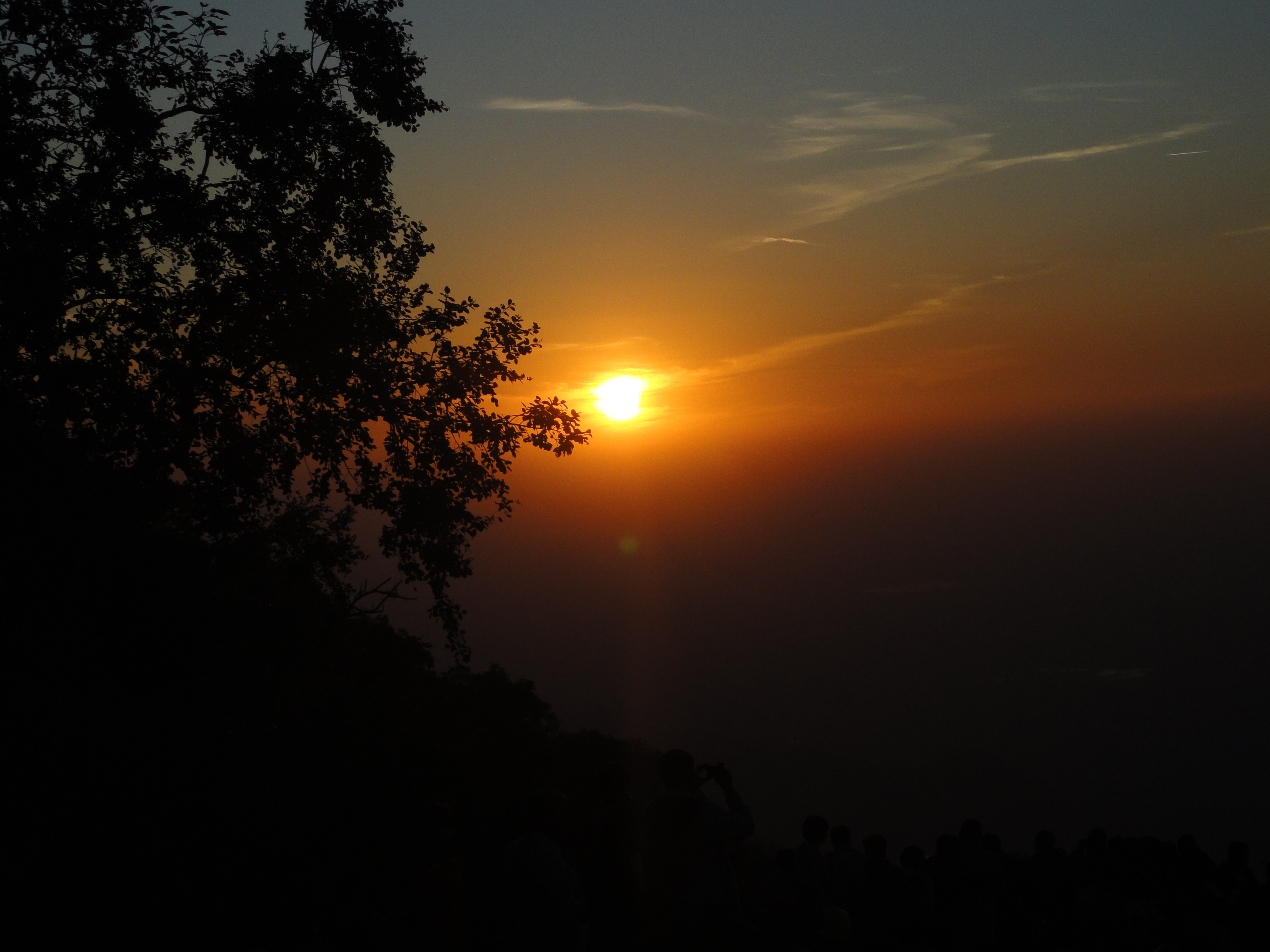 Sunset at Mt. Abu taken on December 16, 2010